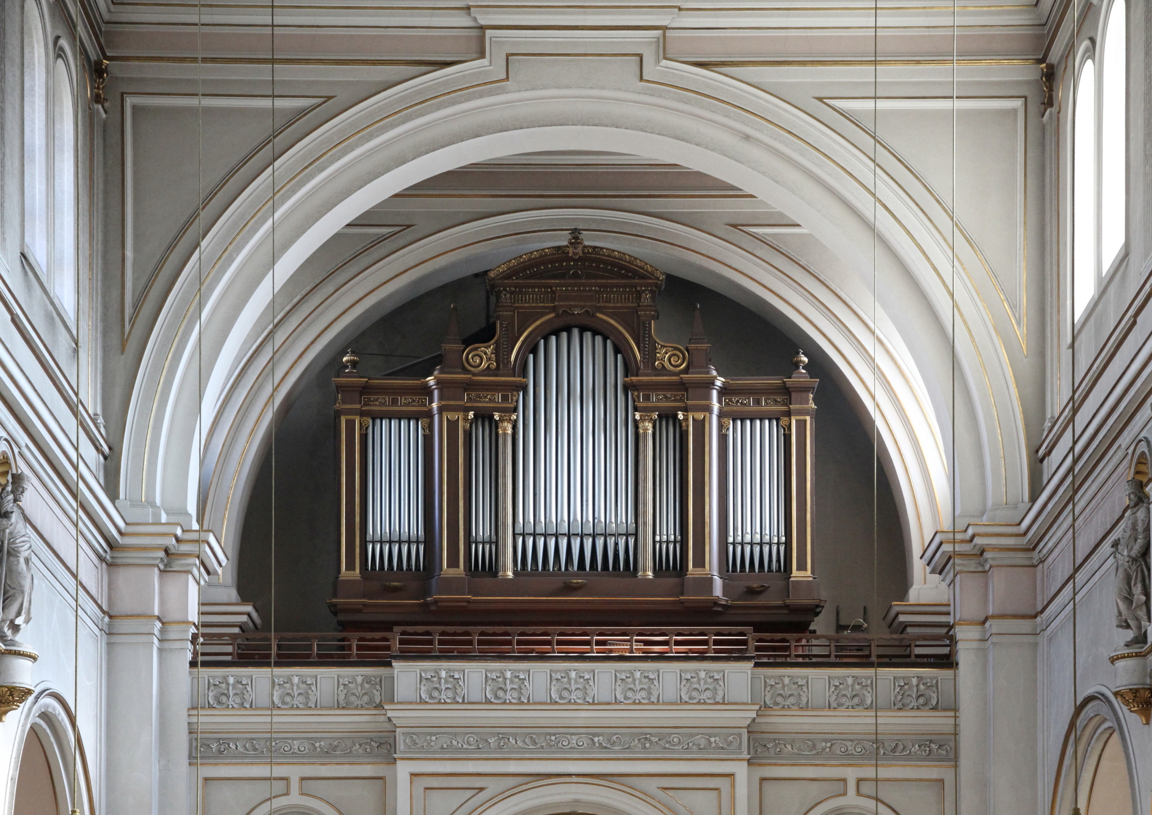 Die Orgel der katholischen Pfarrkirche hl. Johann Evangelist am Keplerplatz in Wien.